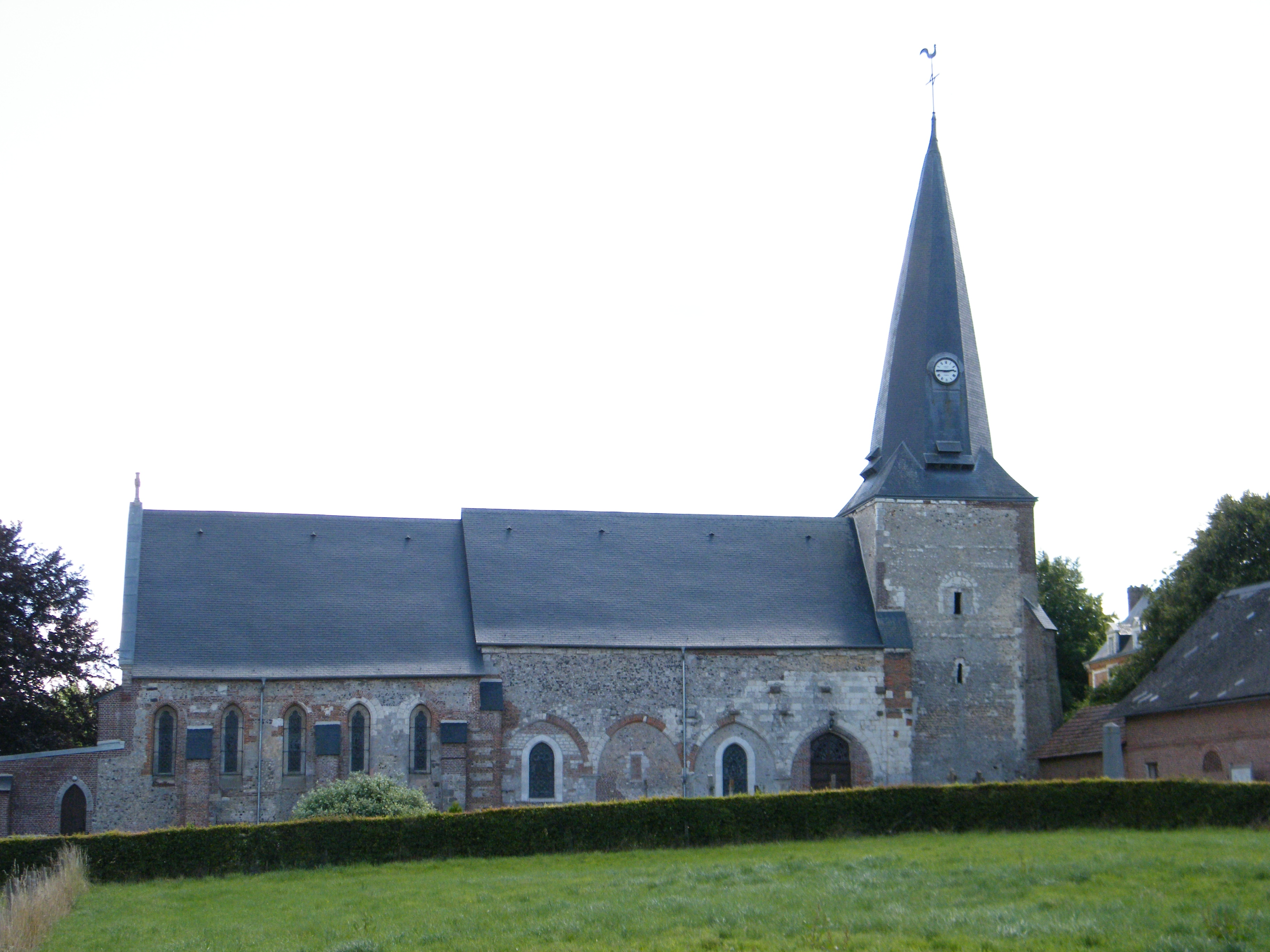 Bailleul-Neuville, Seine-Maritime, France, église